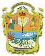 escudo de armas de Cd. Victoria Tamaulipas